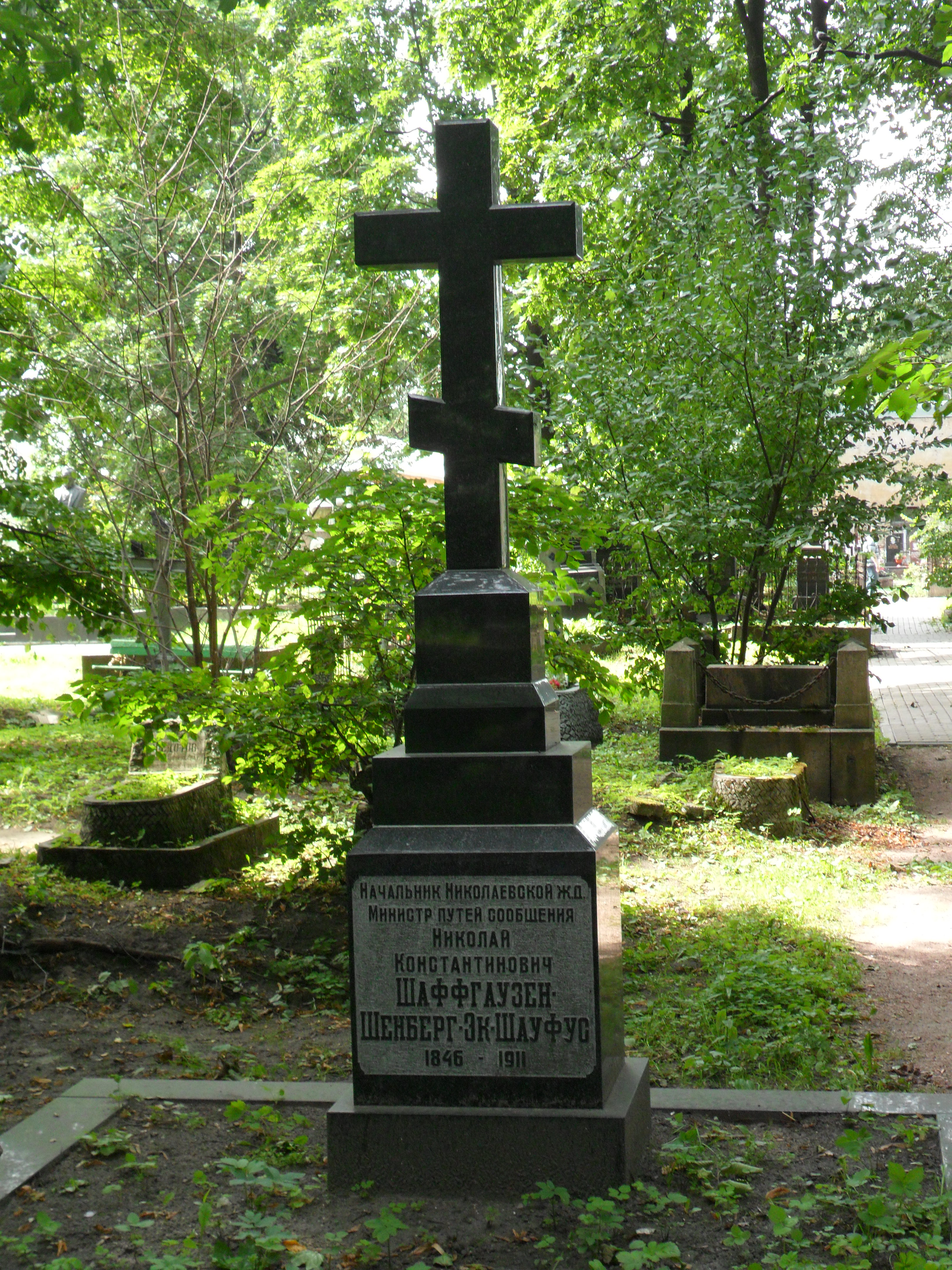 Могила Николая Константиновича Шауфуса на кладбище Новодевичьего монастыря в Санкт-Петербурге